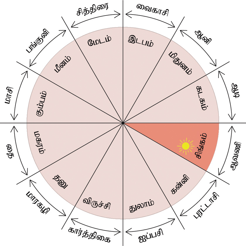 Drawn by the user who uploaded this.